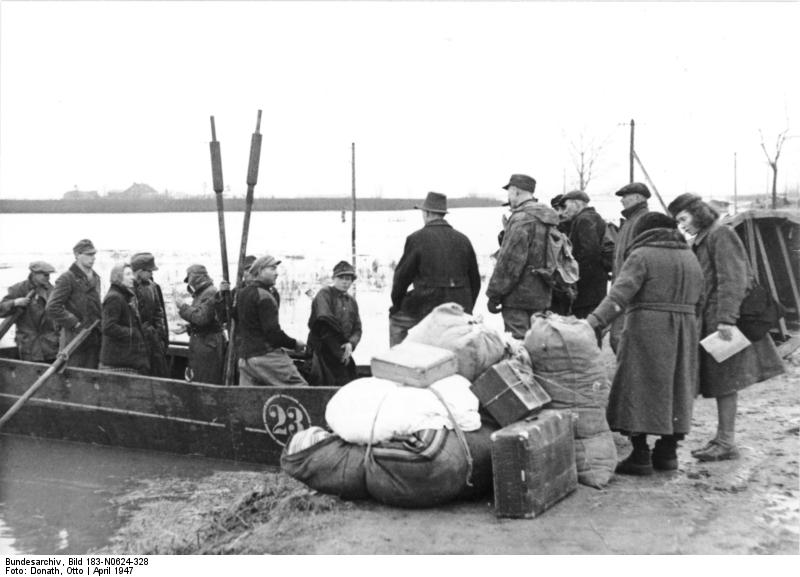 ADN-ZB/Donath Deutschland ( sowjetische Besatzungszone) Hochwasserkatastrophe im Oderbruch. Gerettete aus der überfluteten Ortschaft Letschin werden an Land gebracht. Aufn. April 1947